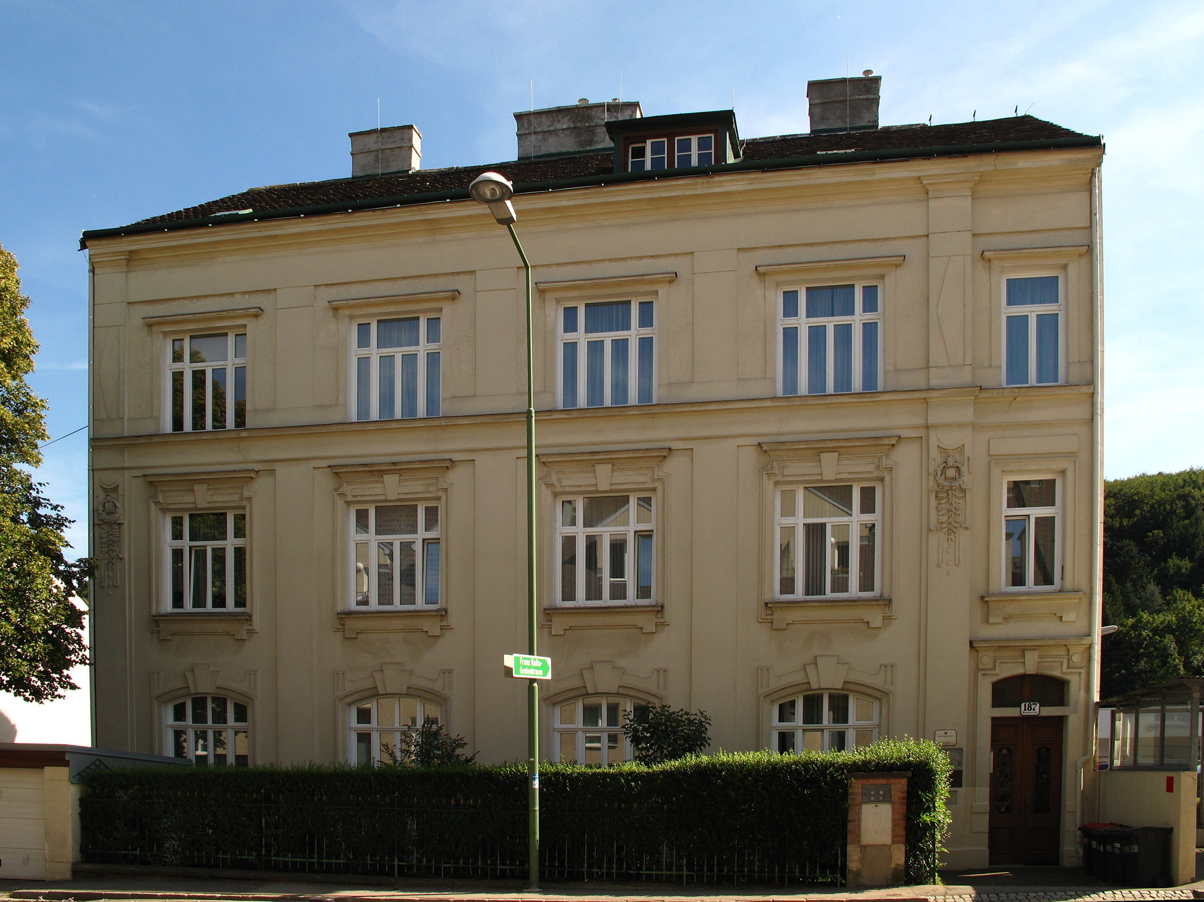 Ehem. Sanatorium Hoffmann, KafkaSterbehaus , Hauptstraße 187, 3400 Kierling, Austria